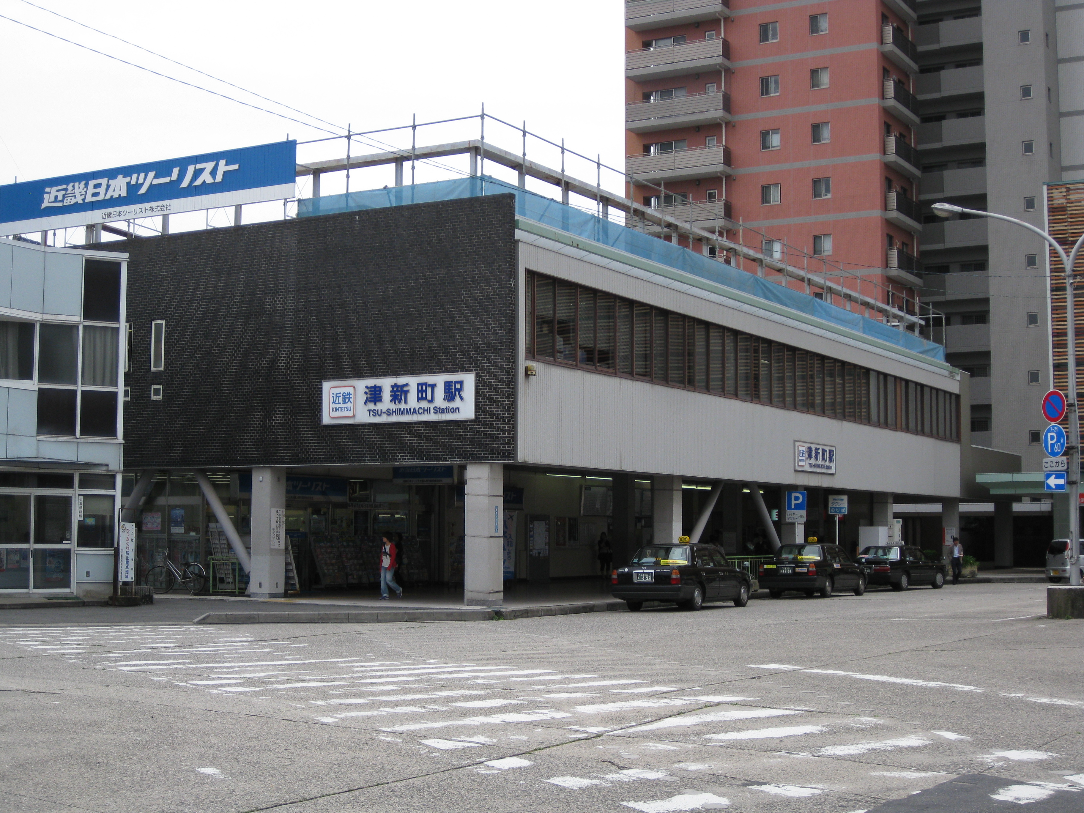 津新町駅